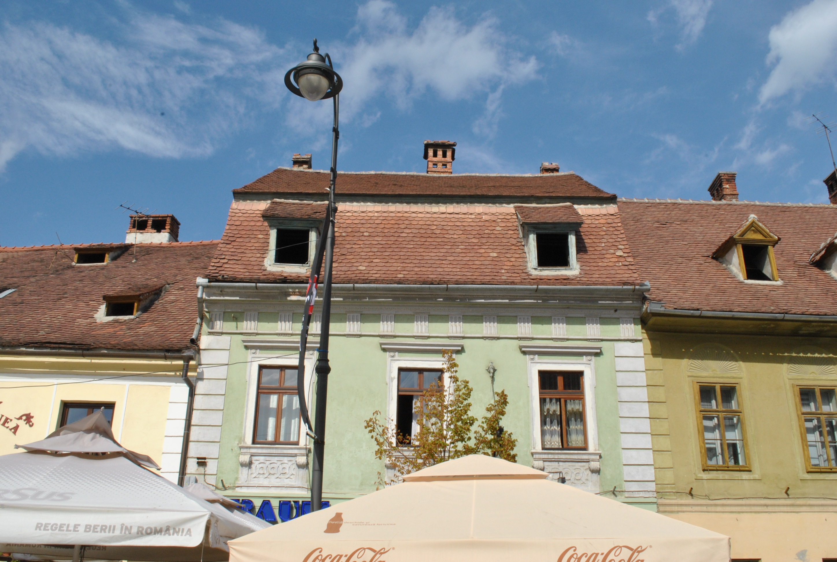 Casă, 1750 - 1800